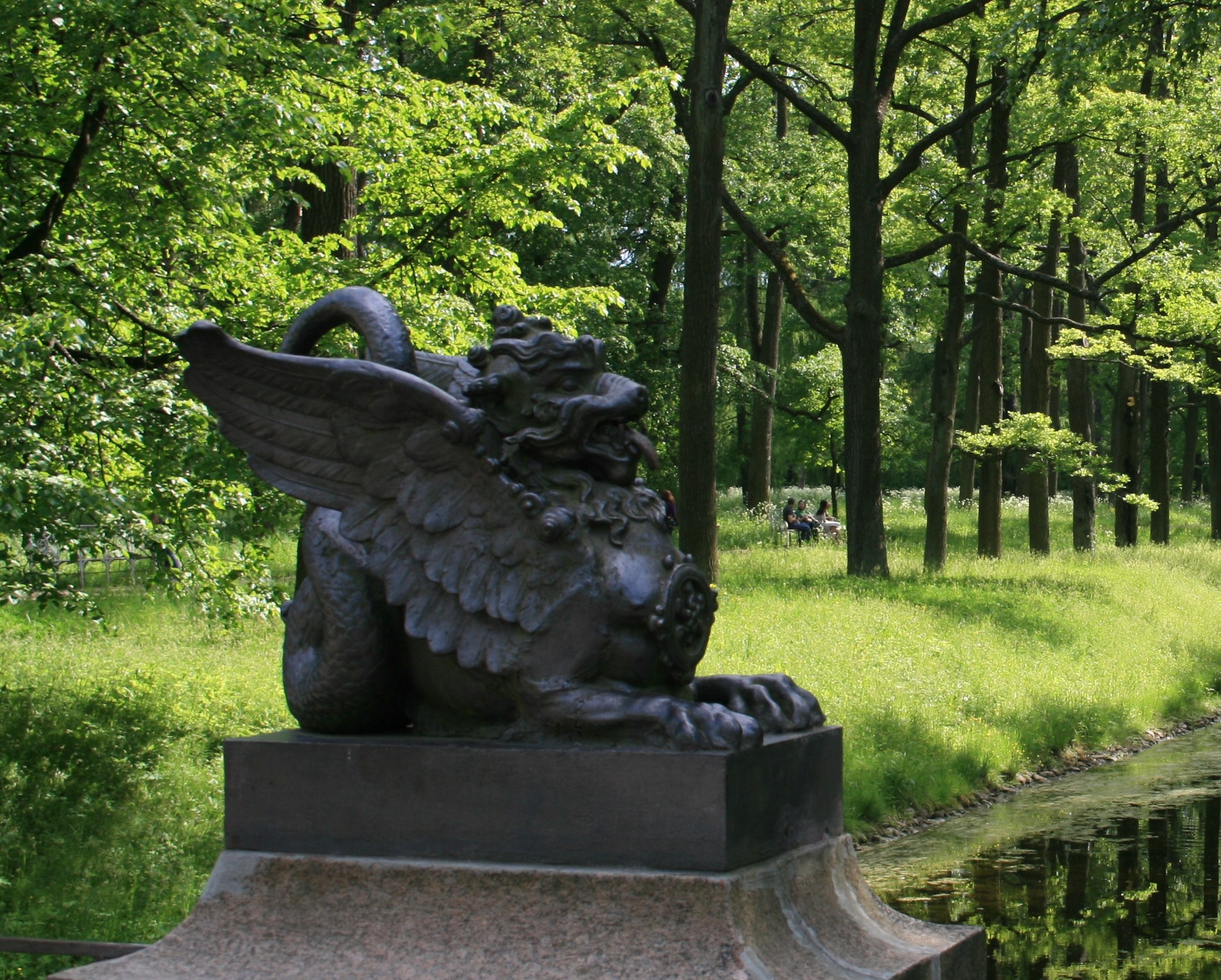 Дракон с драконова моста